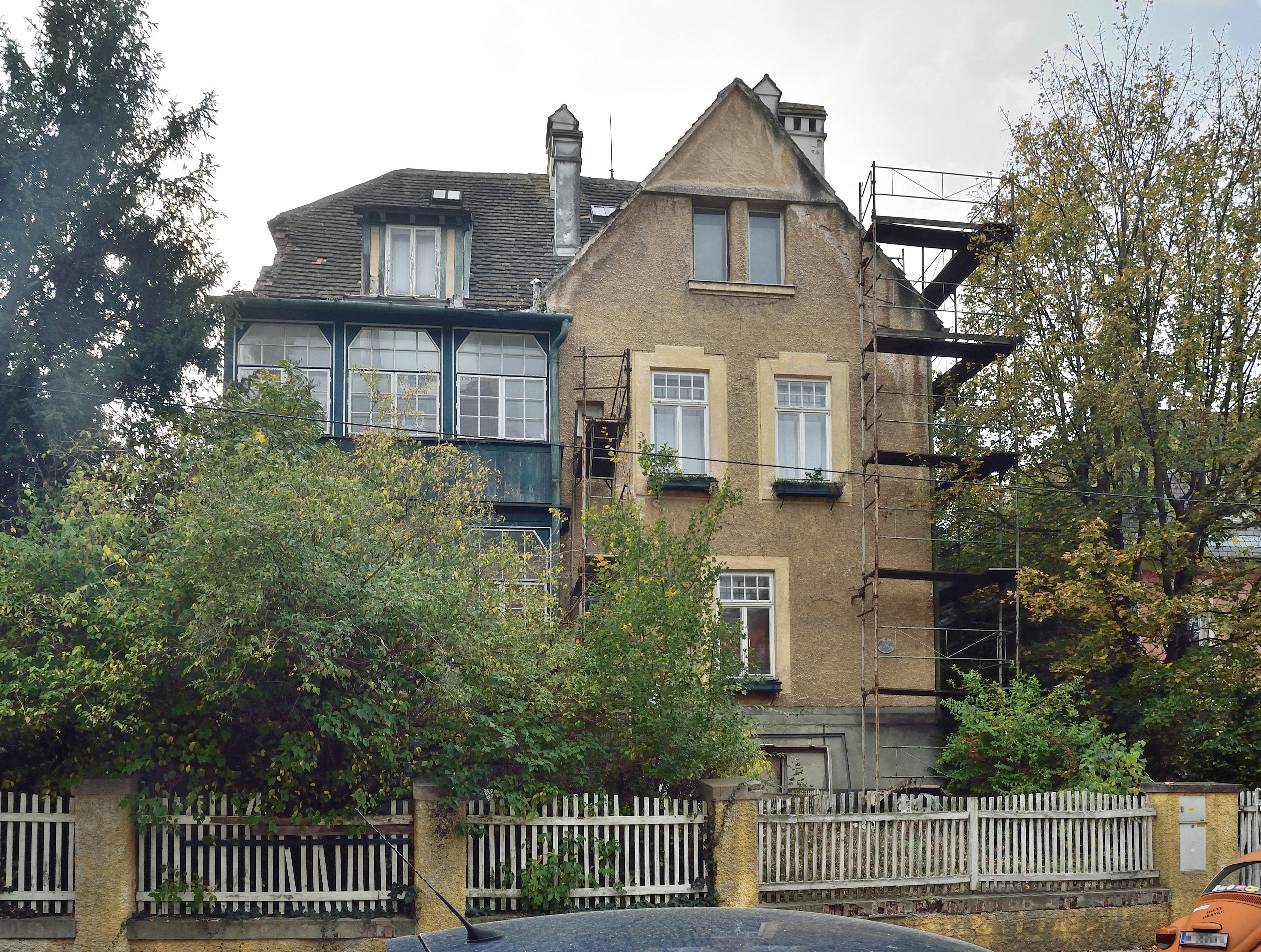 Wohnhaus / Villa Erzbischofgasse 57 in Wien-Hietzing.